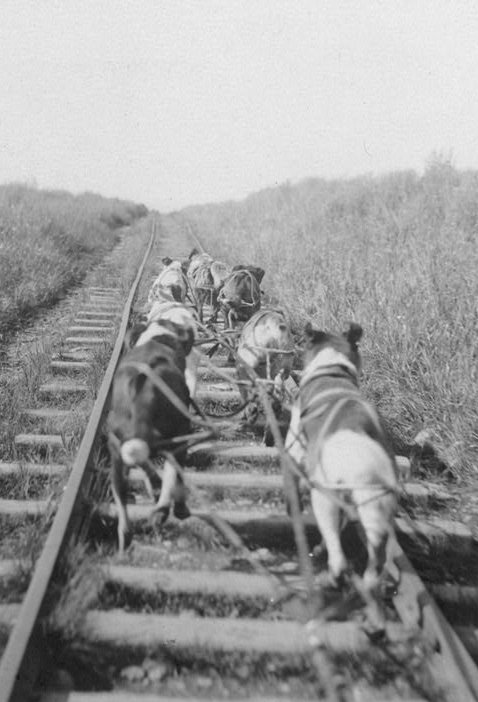 Dogs pulling pupmobile